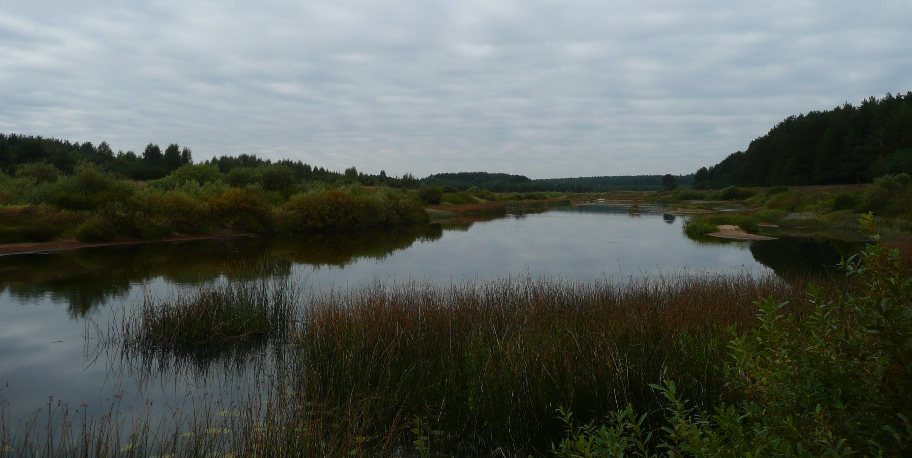 Река Медведица в Тверской области.